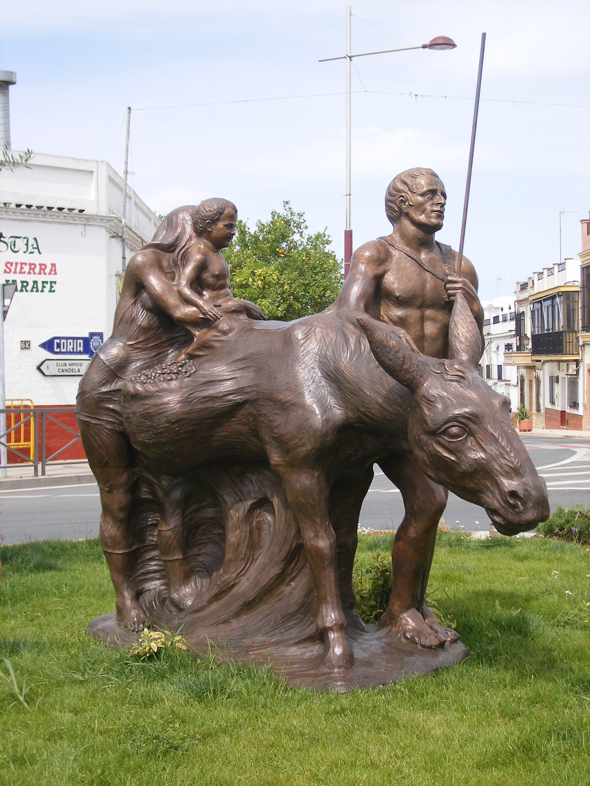 Obra en bronce colocada en Almensilla (Sevilla, España) por el escultor Luigi Maráez.